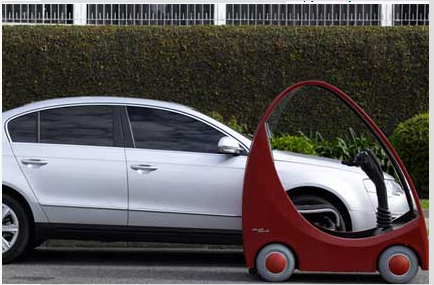 Електромобіль